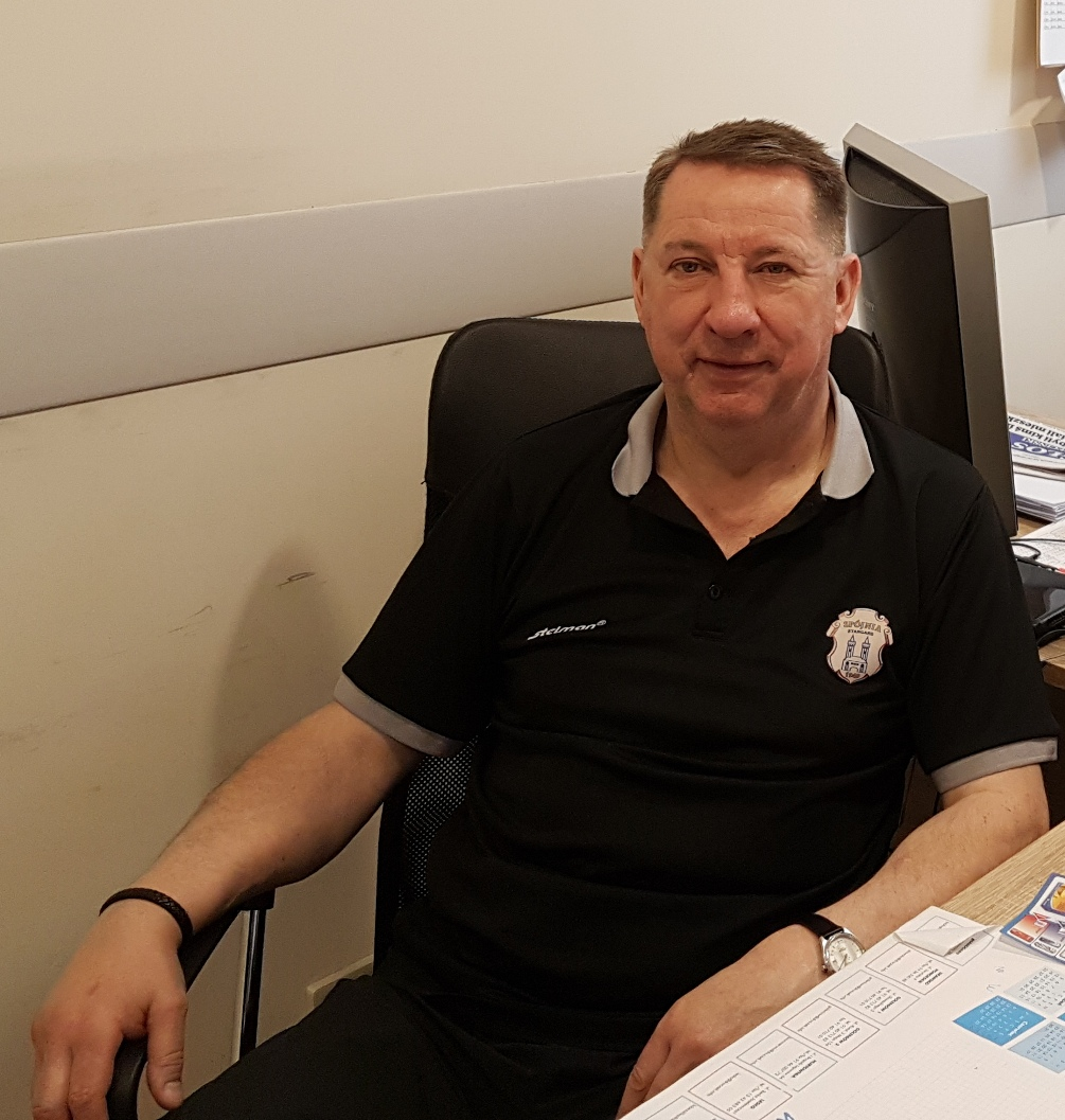 Trener Spójni Krzysztof Koziorowicz (1995)